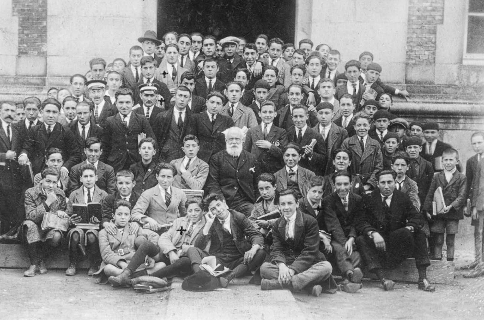 Alumnos do instituto de Pontevedra co profesor Alfredo de la Iglesia (Antón Fraguas é o que está entre os dous ordenanzas.)